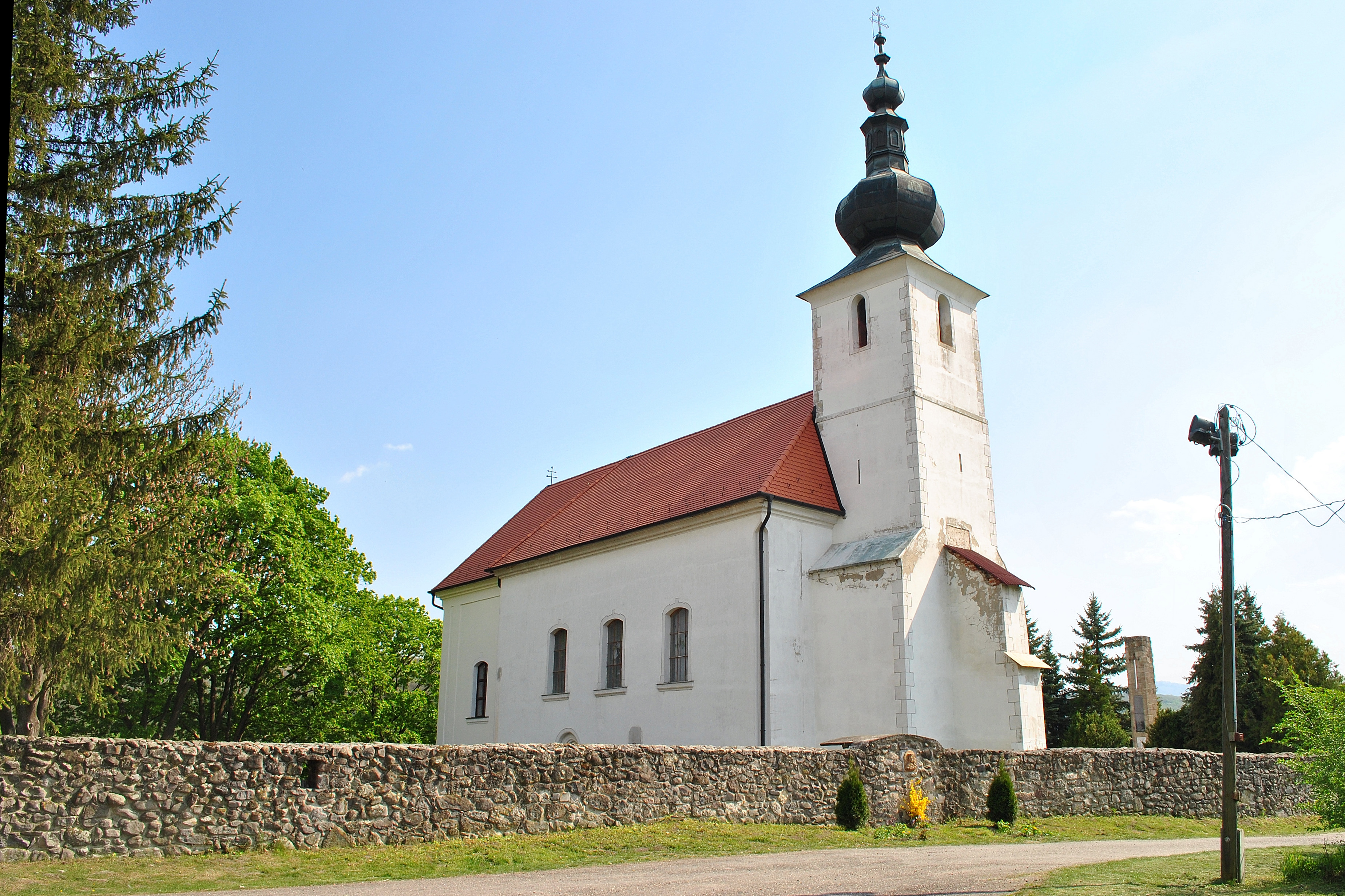 Nagyboldogasszony római katolikus templom (Bernecebaráti, Várhegy)